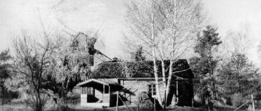 Museibyggnaderna i Hinkaböle Pyttis (Pyhtää)